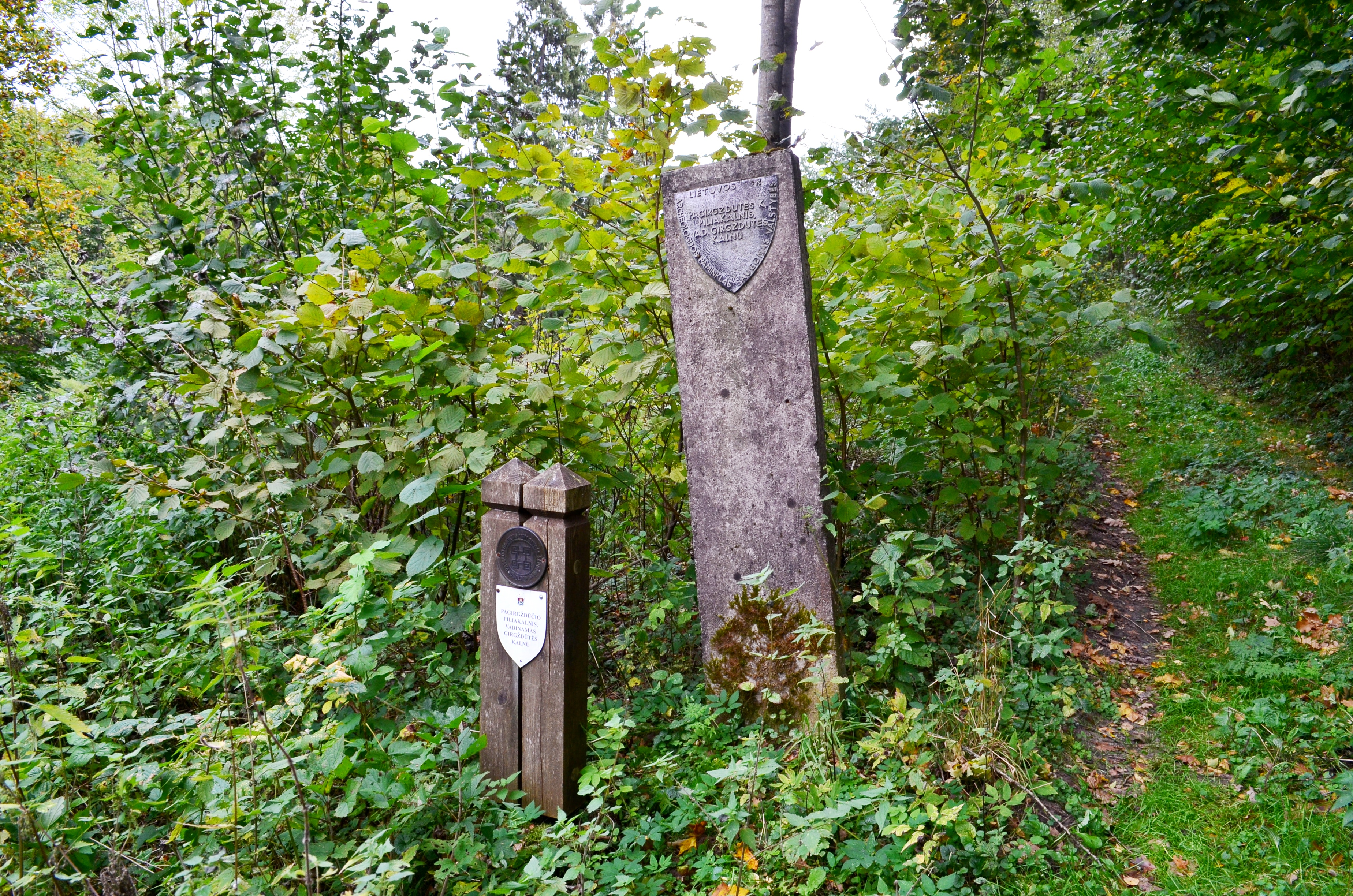 Girgždūtės piliakalnio ženklas, Telšių raj.